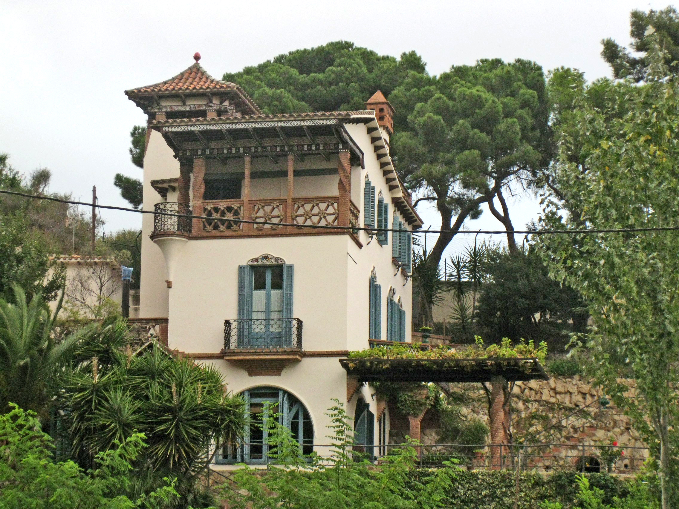 Casa Manuel Dolcet, a l'avinguda de Vallvidrera núm. 44, al barri de Sarrià (Barcelona). Obra modernista de Joan Rubió i Bellver (1906-07). Hi destaquen les decoracions de columnes salomòniques de maó i el balconet rodó amb barana de ferro forjat en un cantó.